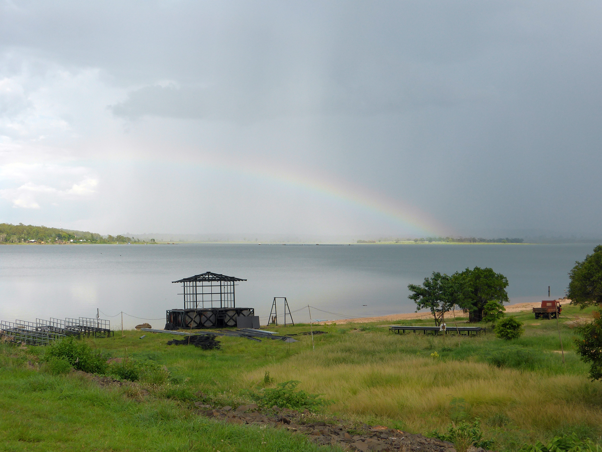 Lam-Nang-Rong-Stausee bei Non Din Daeng, 15.06.2016